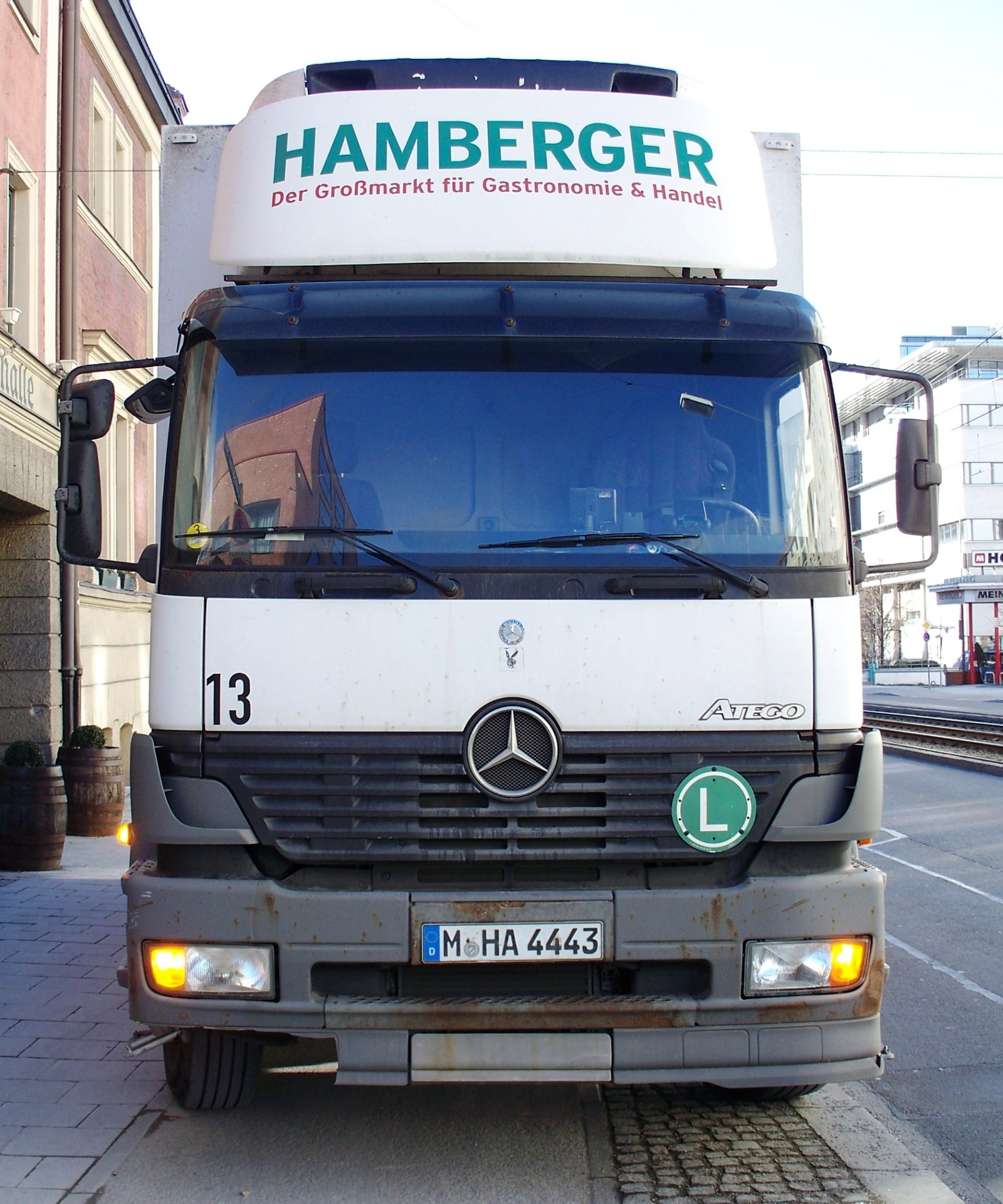 Frontansicht eines Mercedes-Benz-Atego-LKW in München.